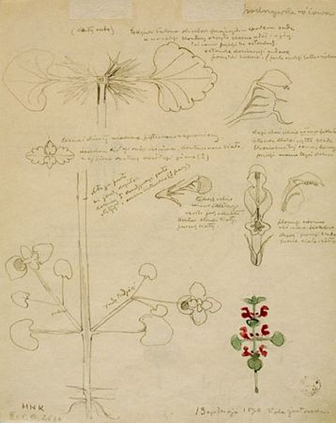 Zielnik, Stanisław Wyspiański (1869-1907). Jasnota purpurowa (pokrzywka różowa), Muzeum Narodowe w Krakowie.